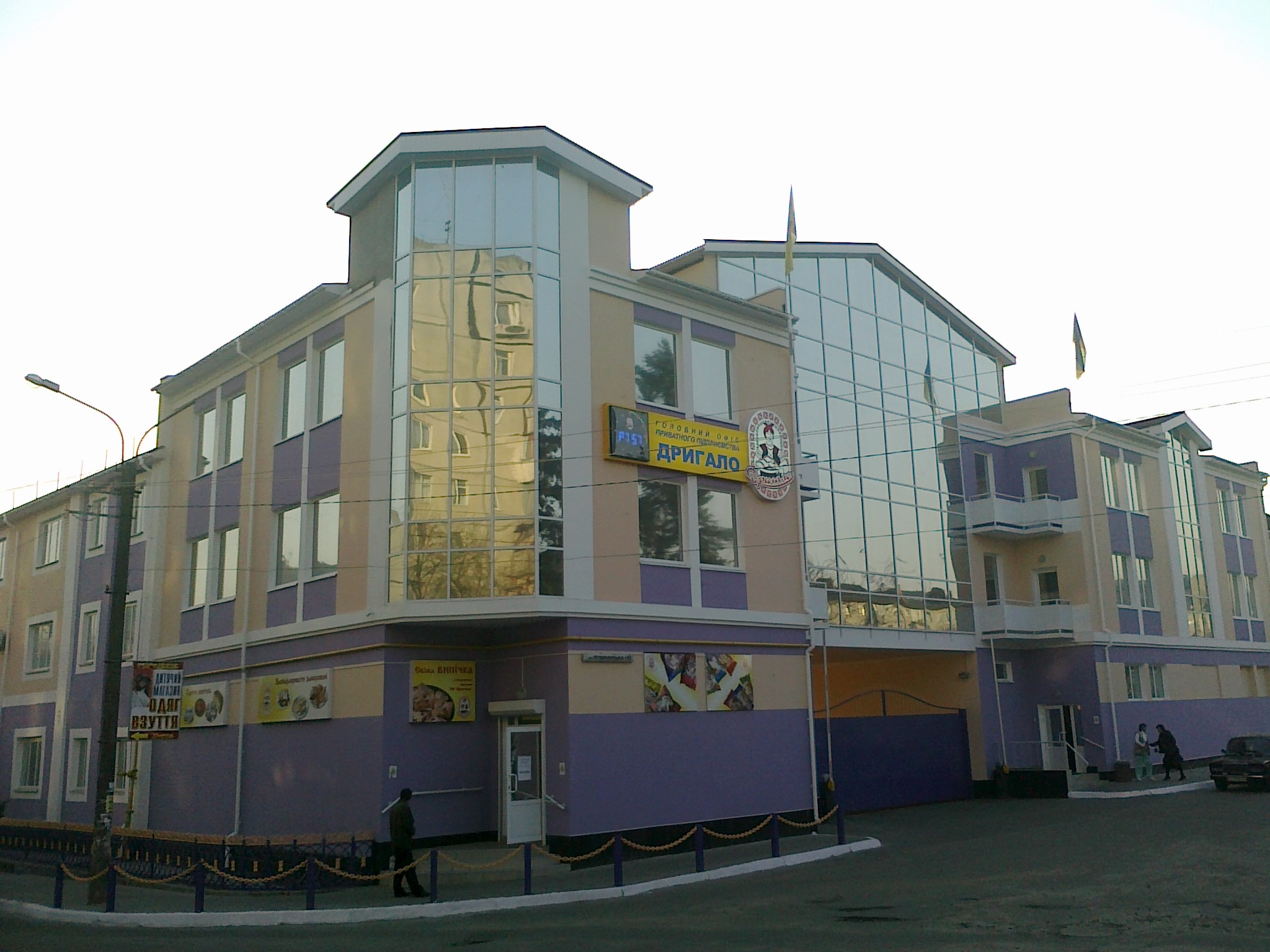 ПП Дригало (Біла Церква)